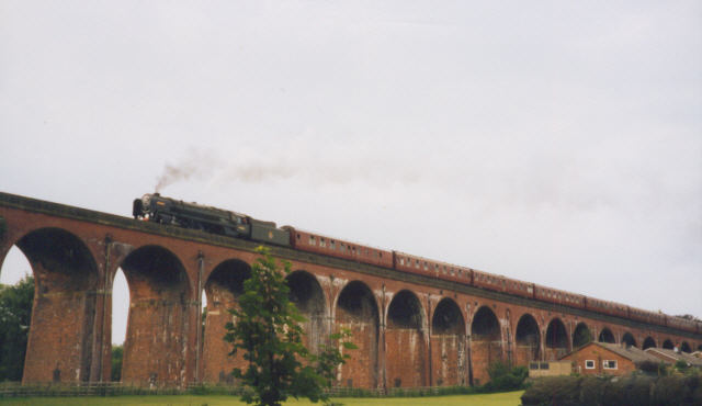 Britannia